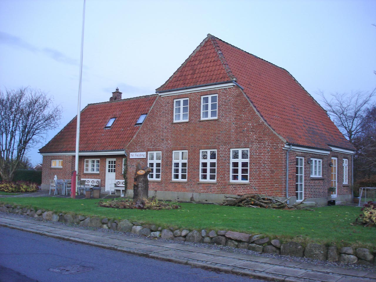 Nørre Felding Station, sporsiden fra S